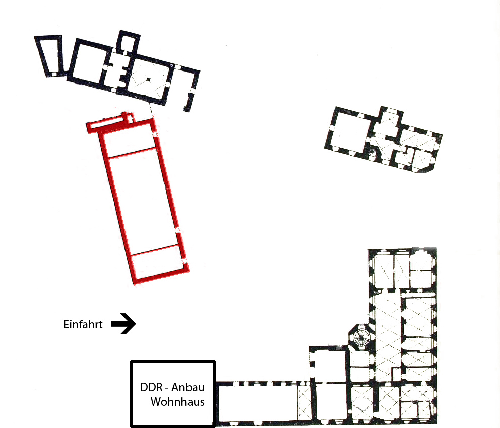 Umgezeichneter und modizierter Grundriss auf Grundlage von Cornelius Gurlitt: Beschreibende Darstellung der älteren Bau - und Kunstdenkmäler in Sachsen. Amtshauptmannschaft Meißen - Land. Meinhold und Söhne, Dresden, 1923. Seite 458.